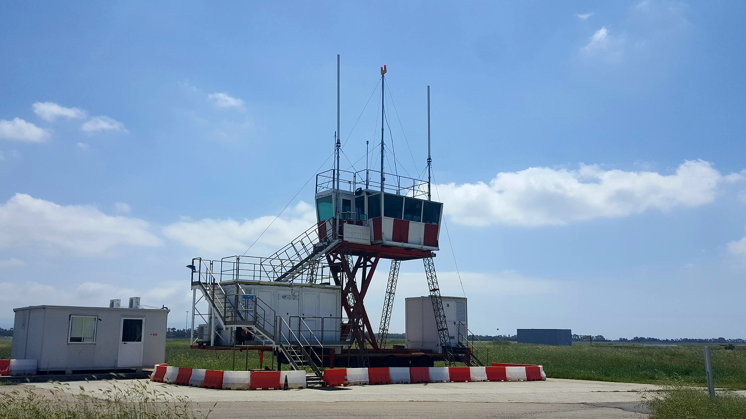 Torre di controllo mobile ENAV in servizio all'Aeroporto di Alghero durante la ristrutturazione della torre di controllo nel 2016. Installata e gestita da Techno Sky.